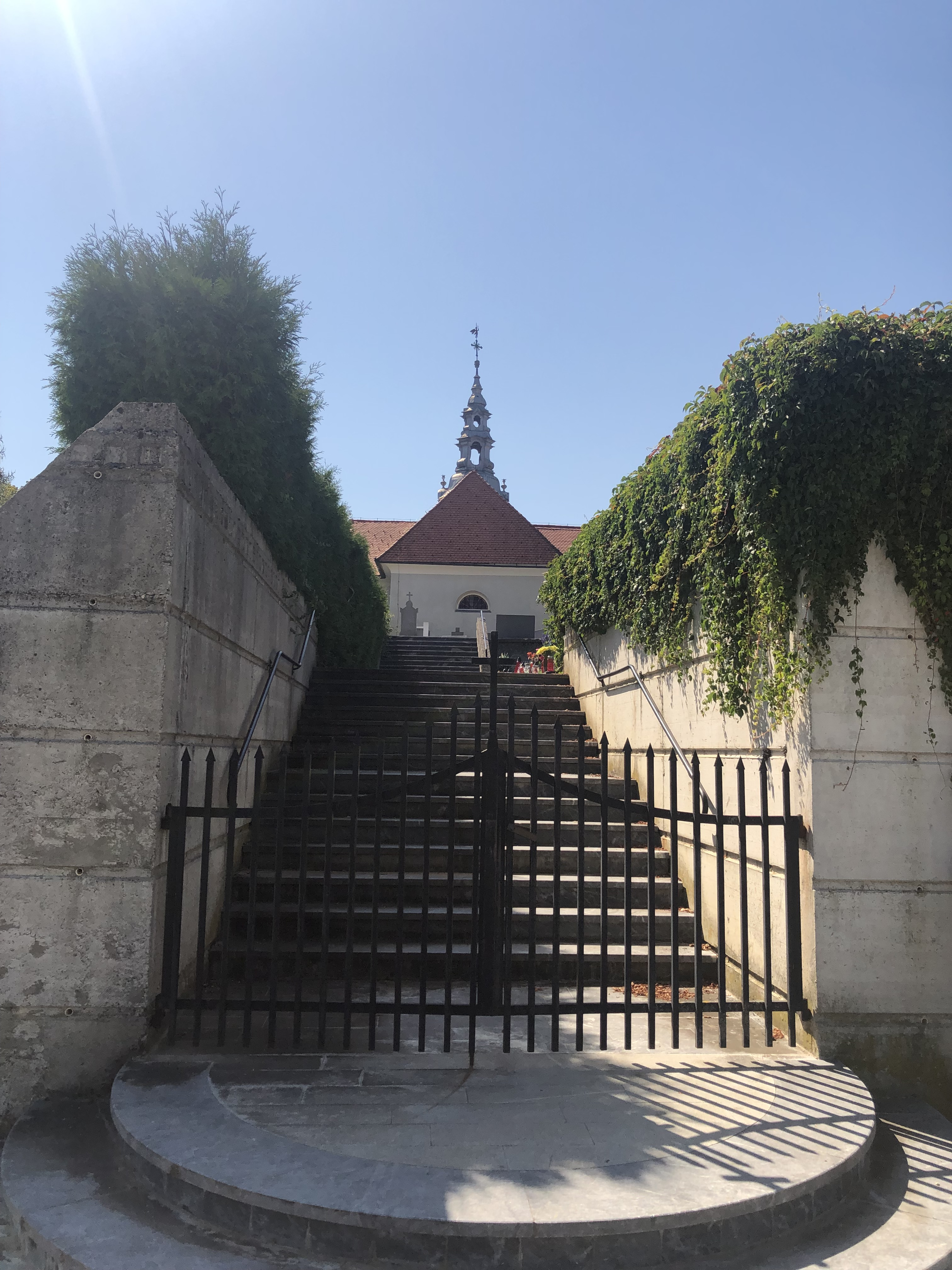 Župnijska cerkev Device Marije